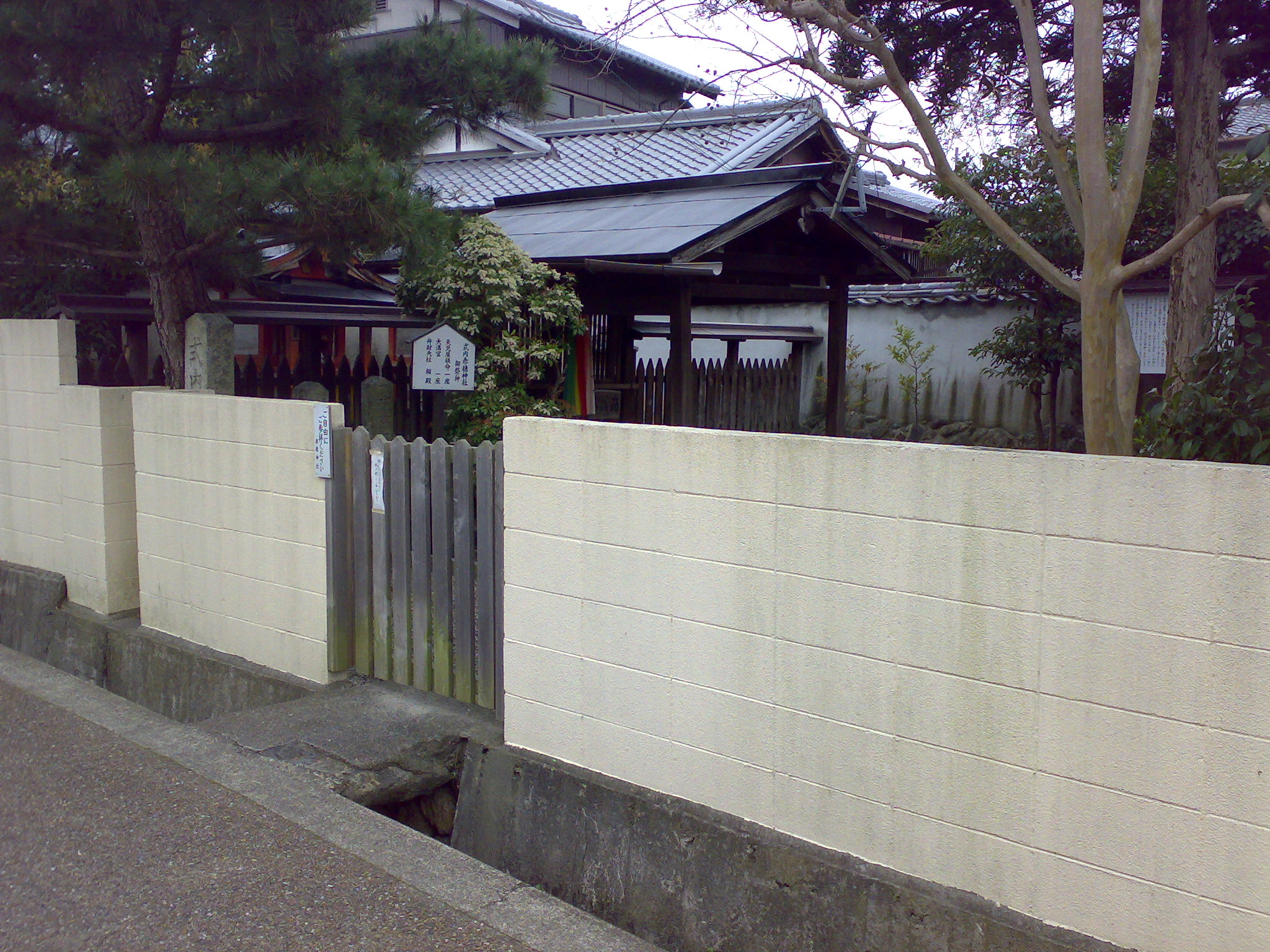 Akoh Shrine